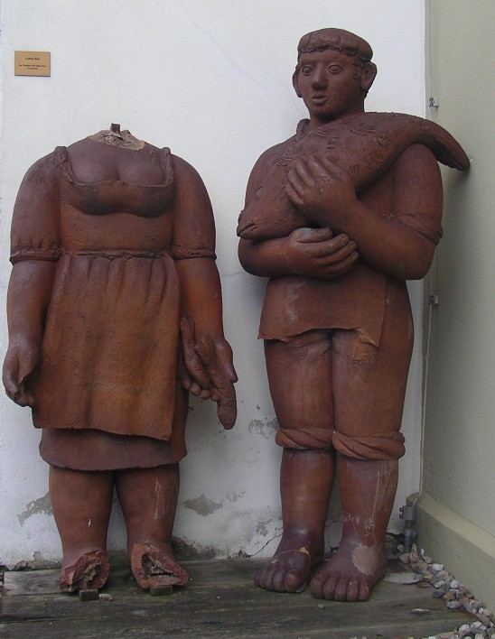 Terrakotta-Skulptur "Der Fischer und seine Frau" von Lothar Sell Standort: Museum Eisenhüttenstadt (Fürstenberg), Hof